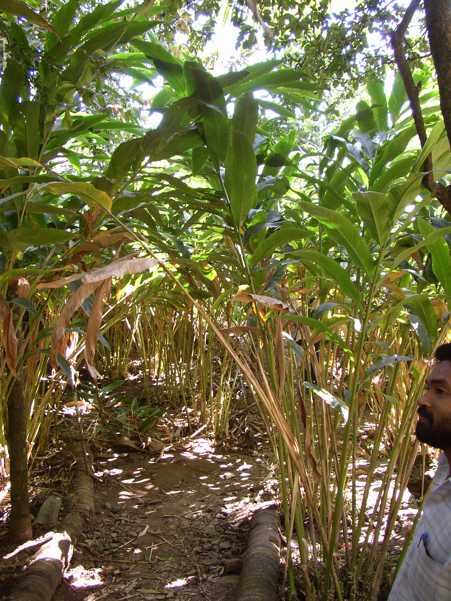 Kardamompflanze, Kumili, Kerala, India